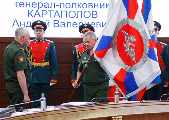 Вручение личного штандарта заместителю Министра обороны Российской Федерации — начальнику Главного военно-политического управления Вооруженных Сил Российской Федерации генерал-полковнику Андрею Картаполову на заседании Коллегии Министерства обороны Российской Федерации в Национальном центре управления обороной.